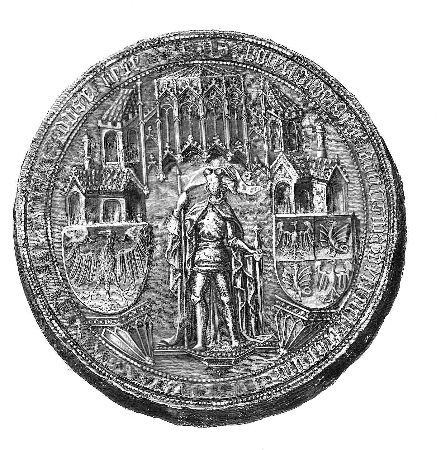 Bolesław V Warszawski seal